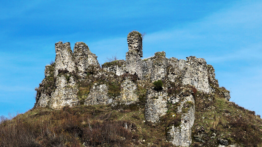 بقایای قلعه گردن-رودسر--قلعه گردن بنایی تاریخی است